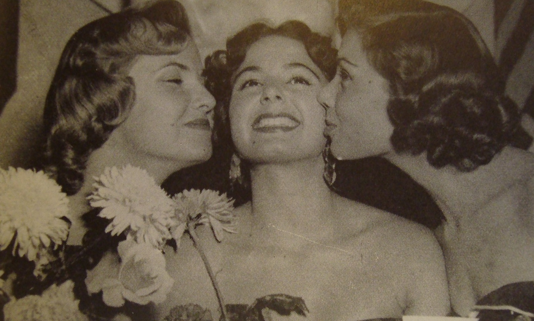 ミス・ワールド1954、戴冠直後。